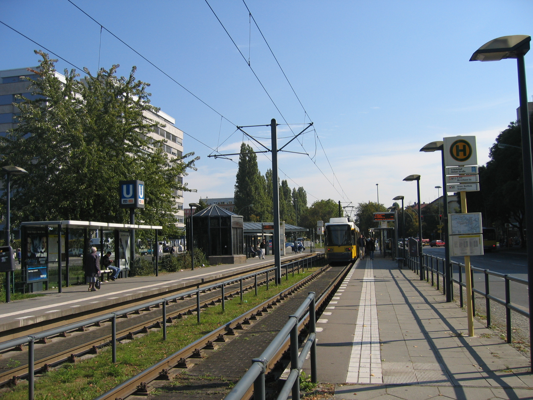 Berlin Osloer Straße, Straßenbahnhaltestelle